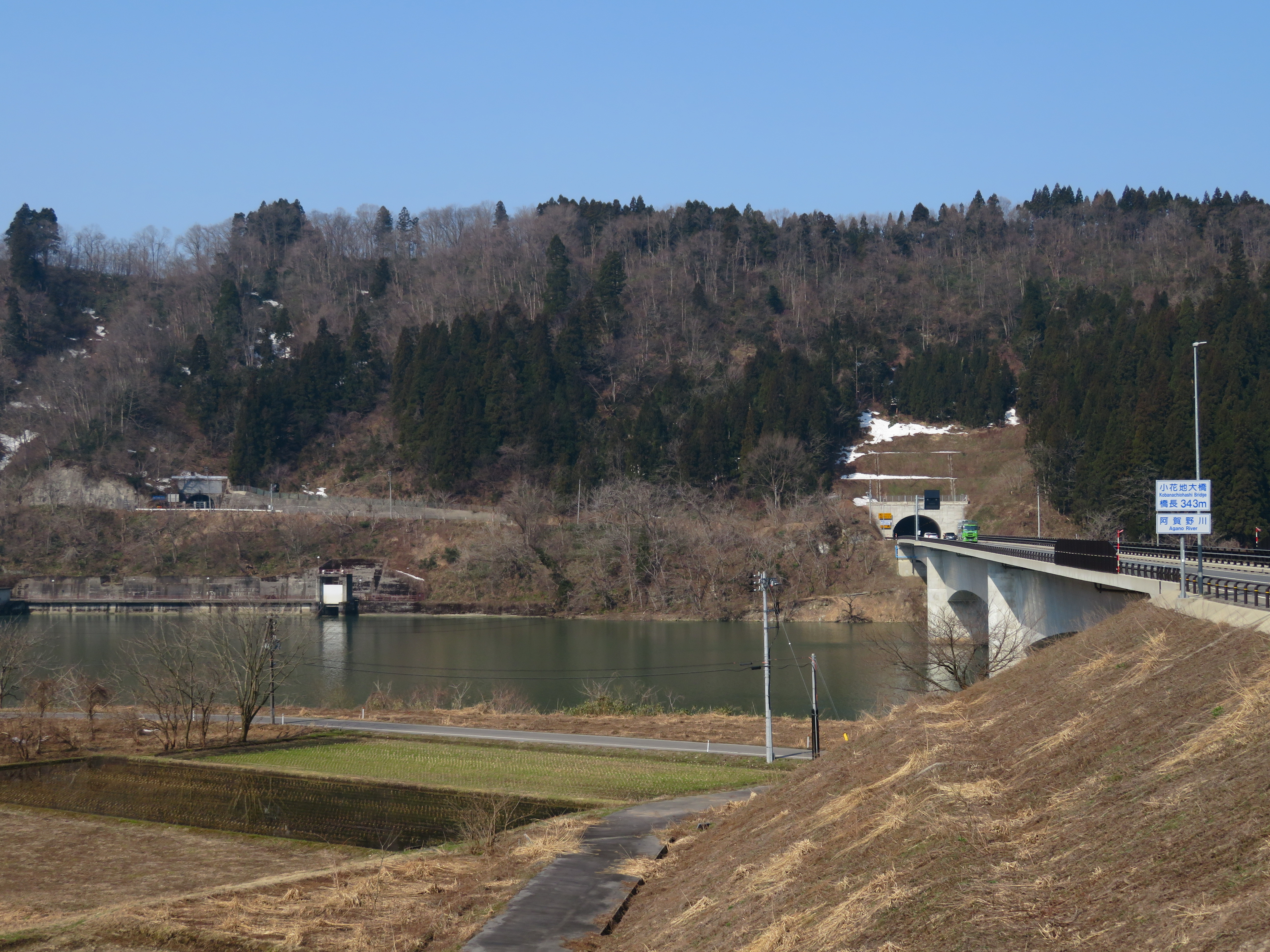 国道49号線 新潟県阿賀町黒岩トンネル（写真右側）、揚川隧道（写真左側）を小花地大橋付近より撮影